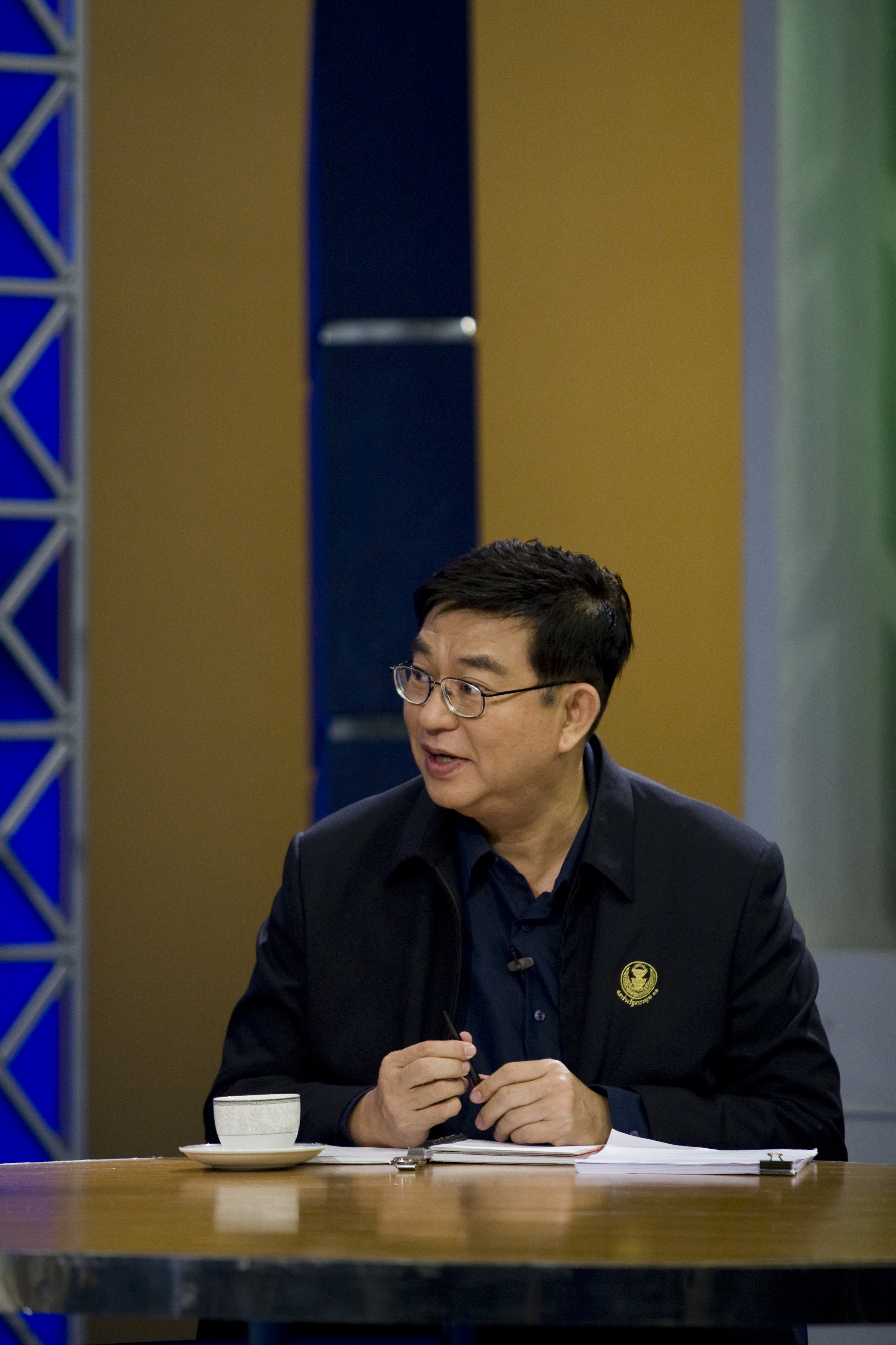 เจิมศักดิ์ ปิ่นทอง / เบื้องหลังการบันทึกเทปรายการ เชื่อมั่นประเทศไทยฯ (The Official Site of The Prime Minister of Thailand Photo by พีรพัฒน์ วิมลรังครัตน์)